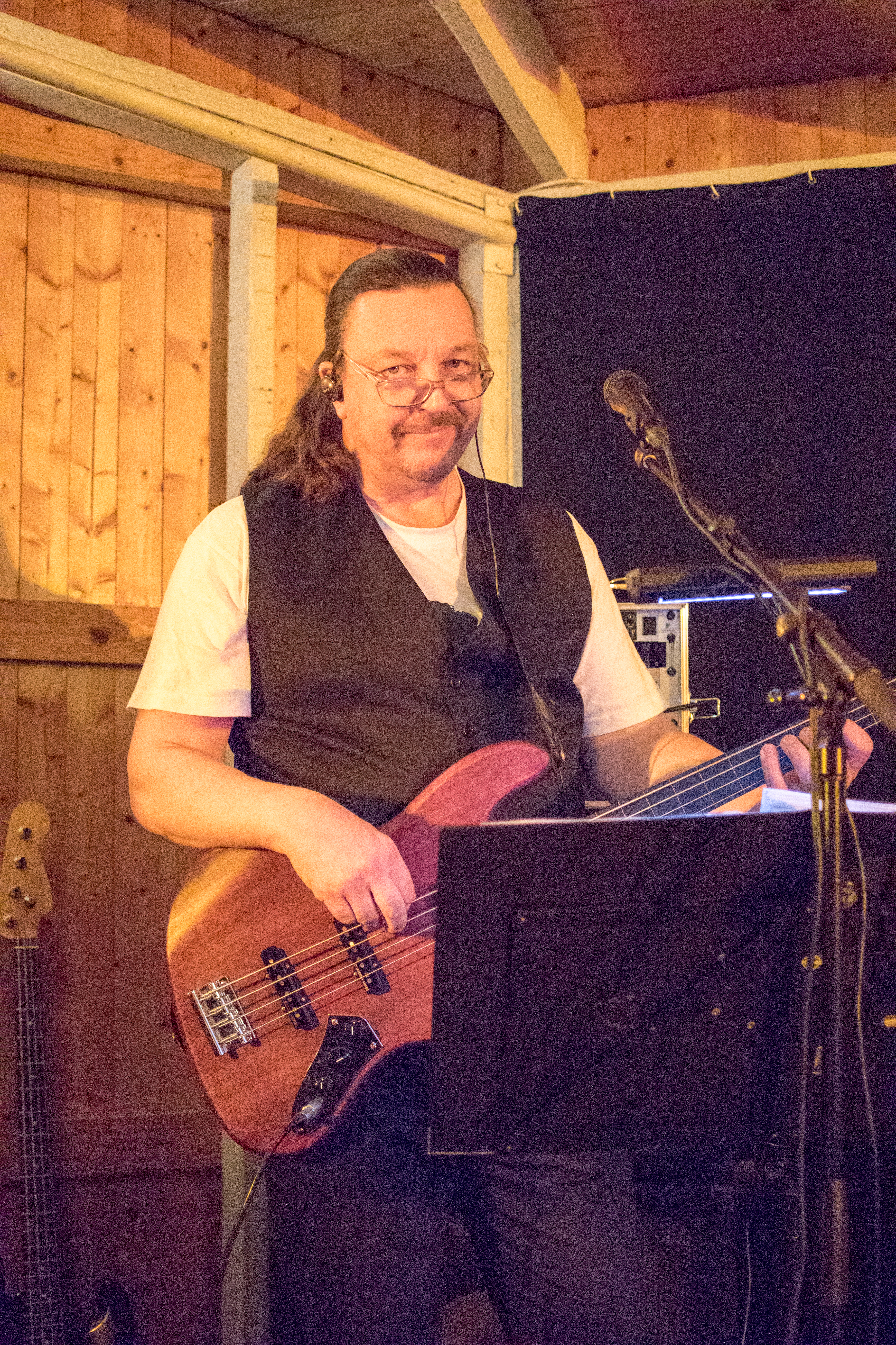 Jukka Kampman suomalainen basisti